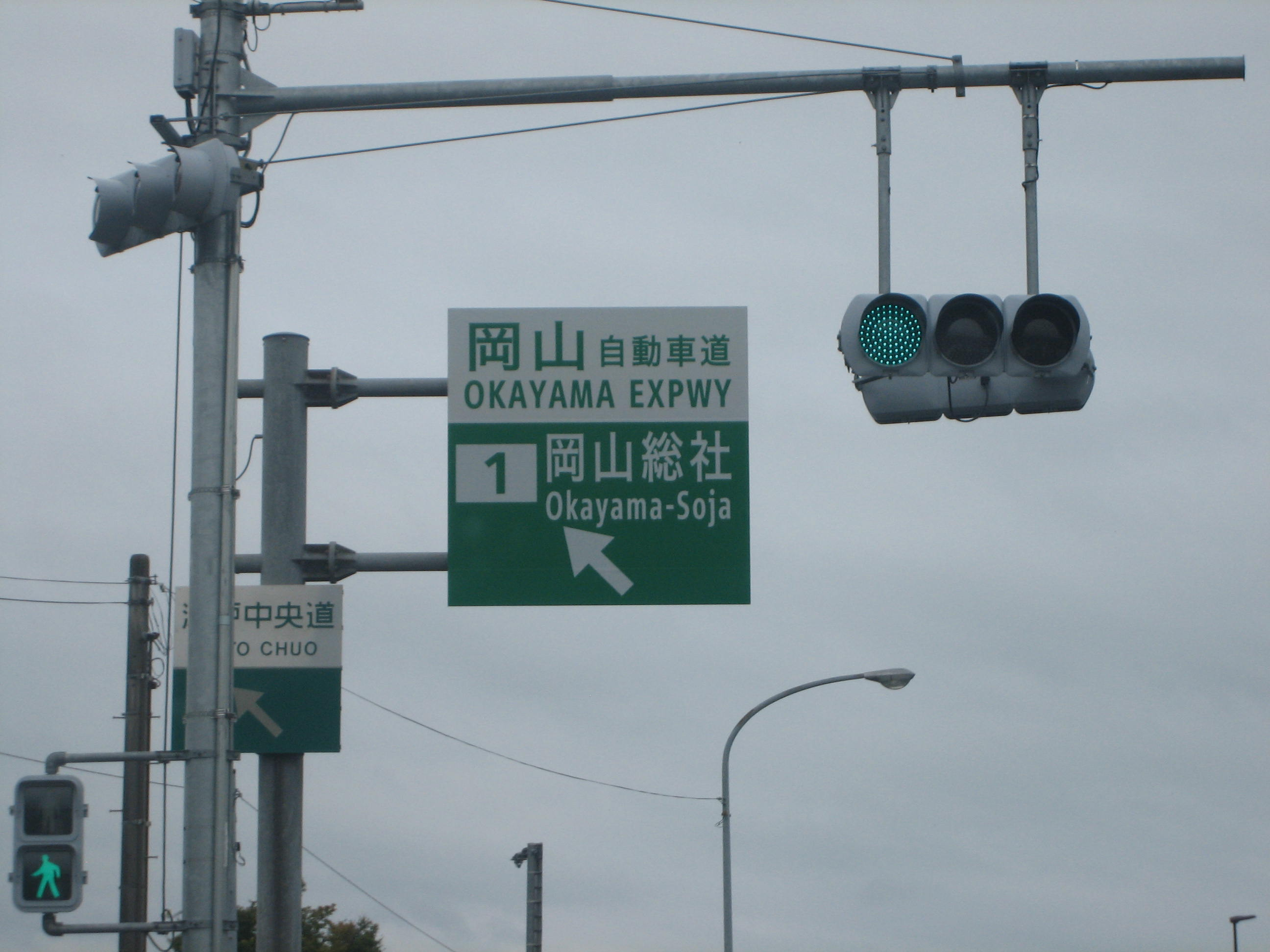 岡山総社IC